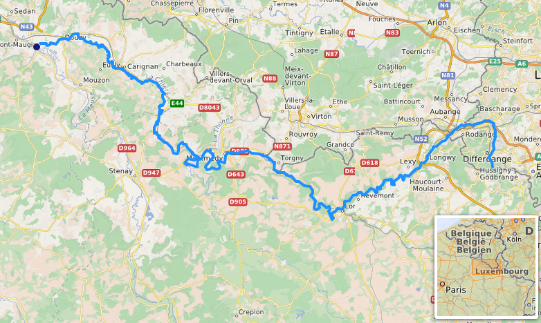 carte réalisée sur umap This map may be incomplete, and may contain errors. Don't rely solely on it for navigation.